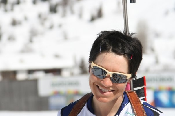 See Title